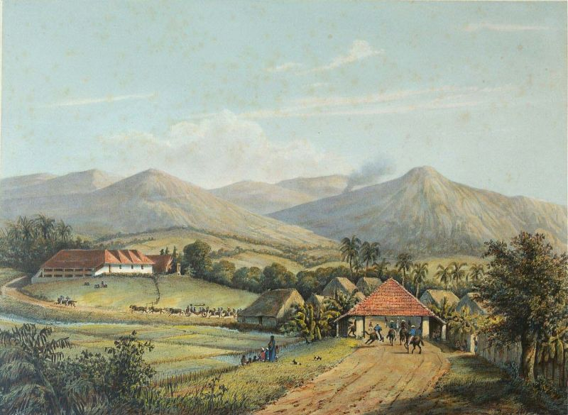 Litho. Litho naar een oorspronkelijk schilderij van A. Salm.. De weg van Buitenzorg naar de Preanger Regentschappen